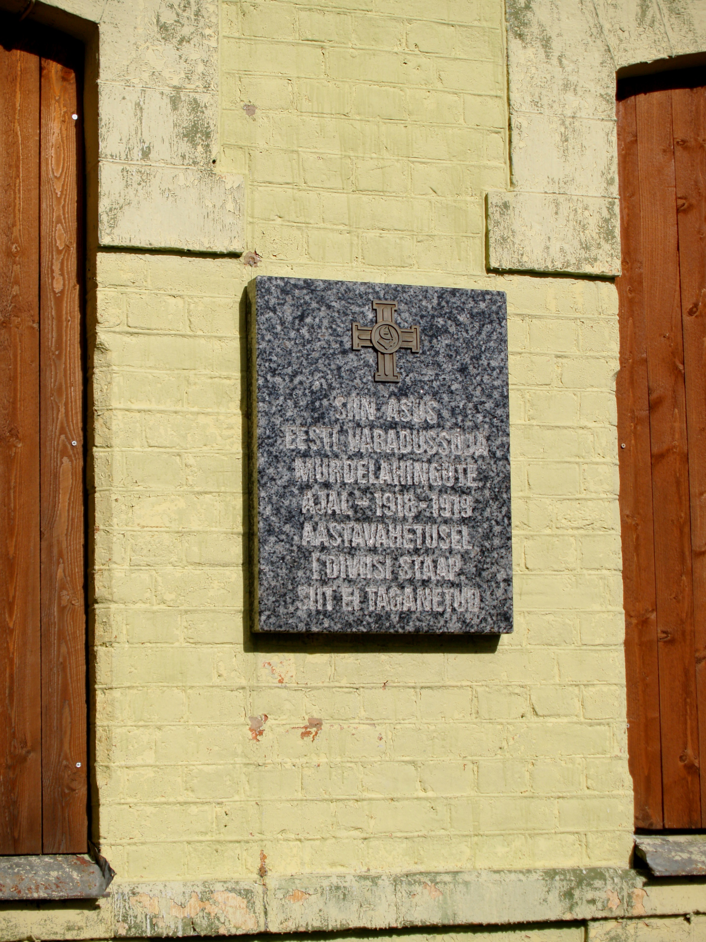 Mälestustahvel kirjaga "Siin asus Eesti Vabadussõja murdelahingute ajal - 1918-1919 aastavahetusel I diviisi staap. Siit ei taganetud." Kehra raudteejaama jaamahoone seinal. Mälestustahvli tellis Anija Muinsuskaitse Selts ja see avati 1996. aastal.